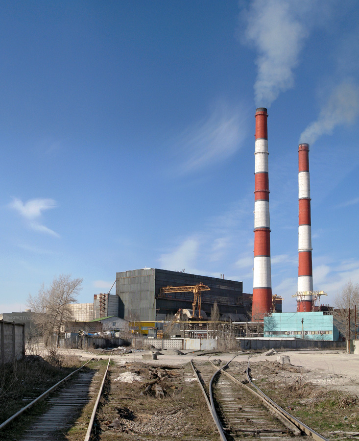 ТЕЦ-5